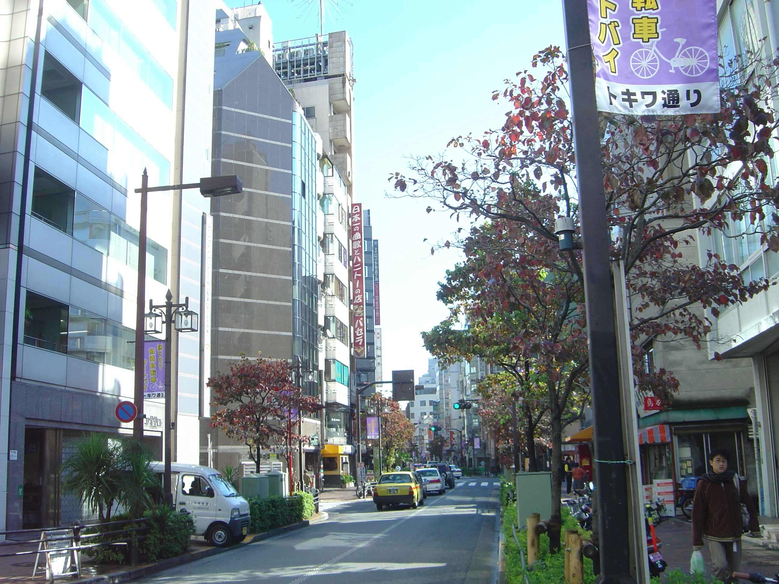 Ikebukuro, Tokyo, Japan